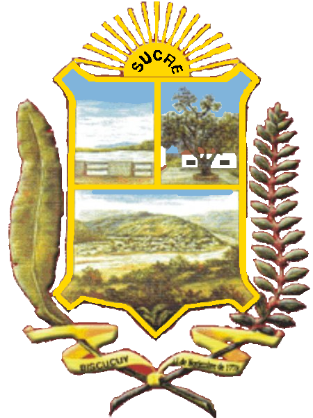 Escudo del municipio Sucre, estado Portuguesa, Venezuela